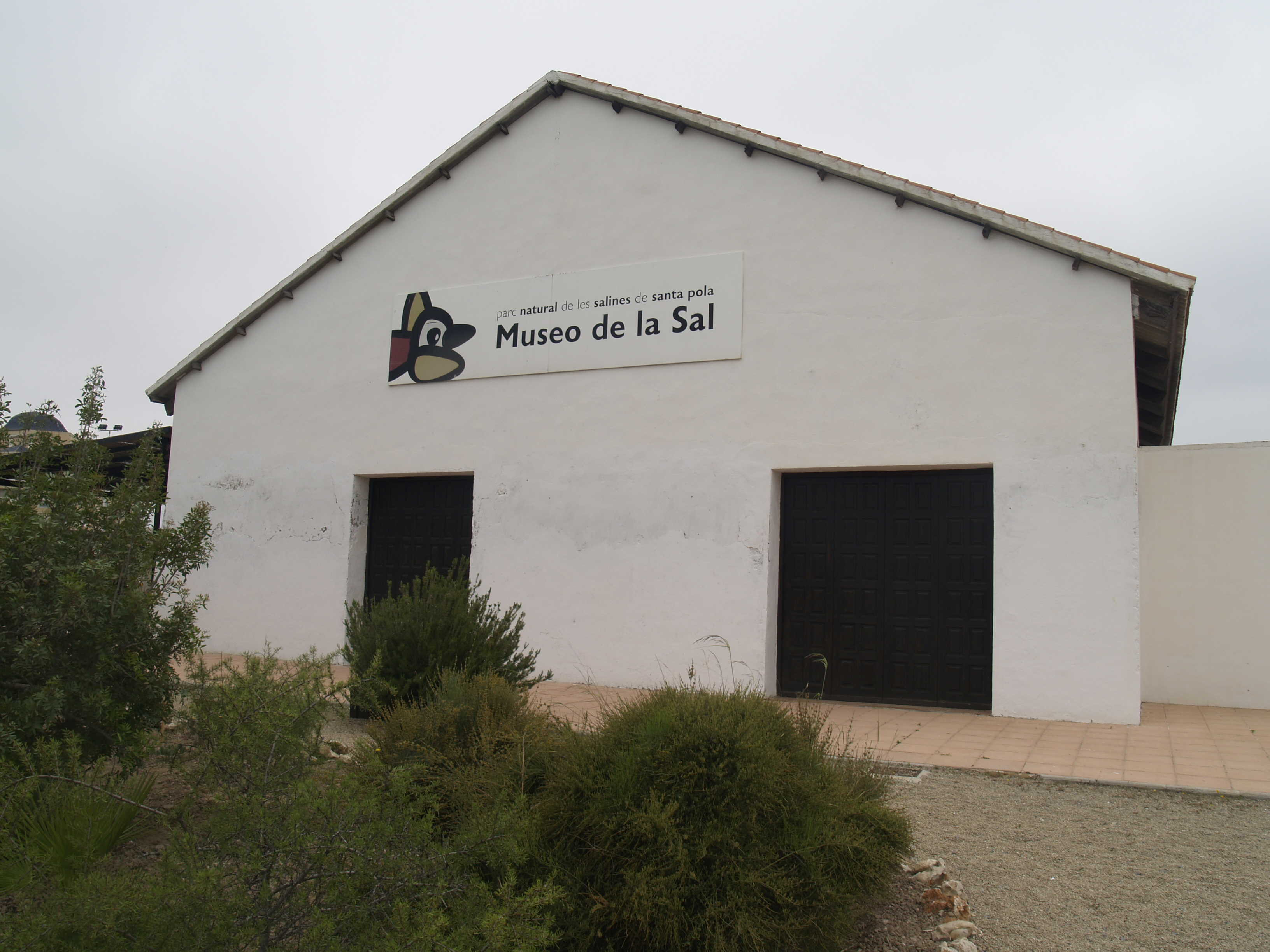 Museo de la Sal en el Parque Natural de las Salinas de Santa Pola This is a photography of a Special Area of Conservation in Spain with the ID: ES0000120. Natura2000 entry, EEA entry